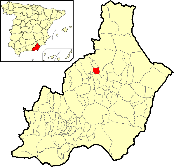 Situación del término municipal de Urrácal respecto a la provincia de Almería, en España.